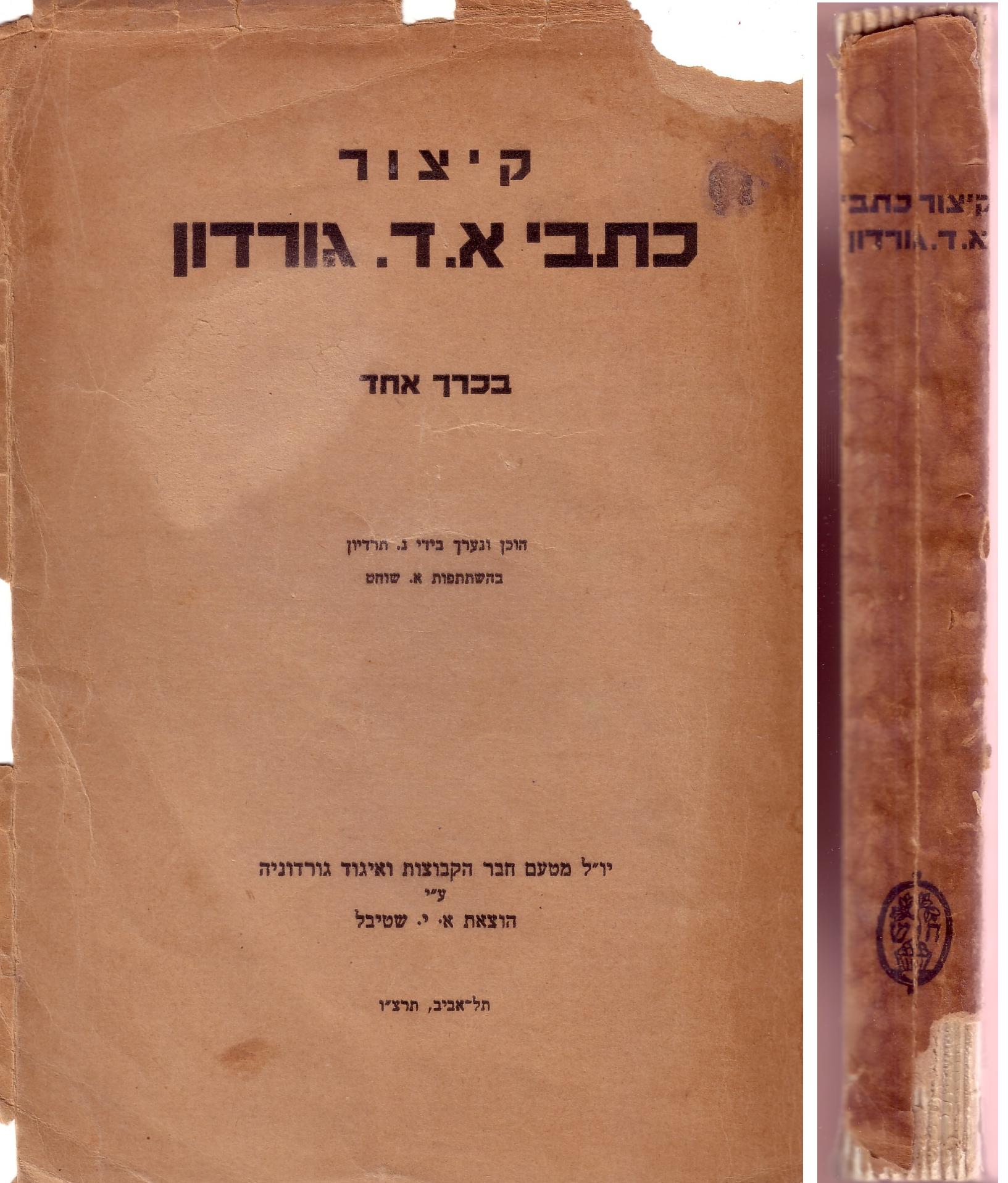 קיצור כתבי א.ד. גורדון, בכרך אחד. הוכן ונערך בידי נ. תרדיון. יו"ל מטעם חבר הקבוצות ואיגוד גורדוניה ע"י הוצאת א. י. שטיבל, תל-אביב, תרצ"ו, נדפס בארץ ישראל (כל המלל במקור).